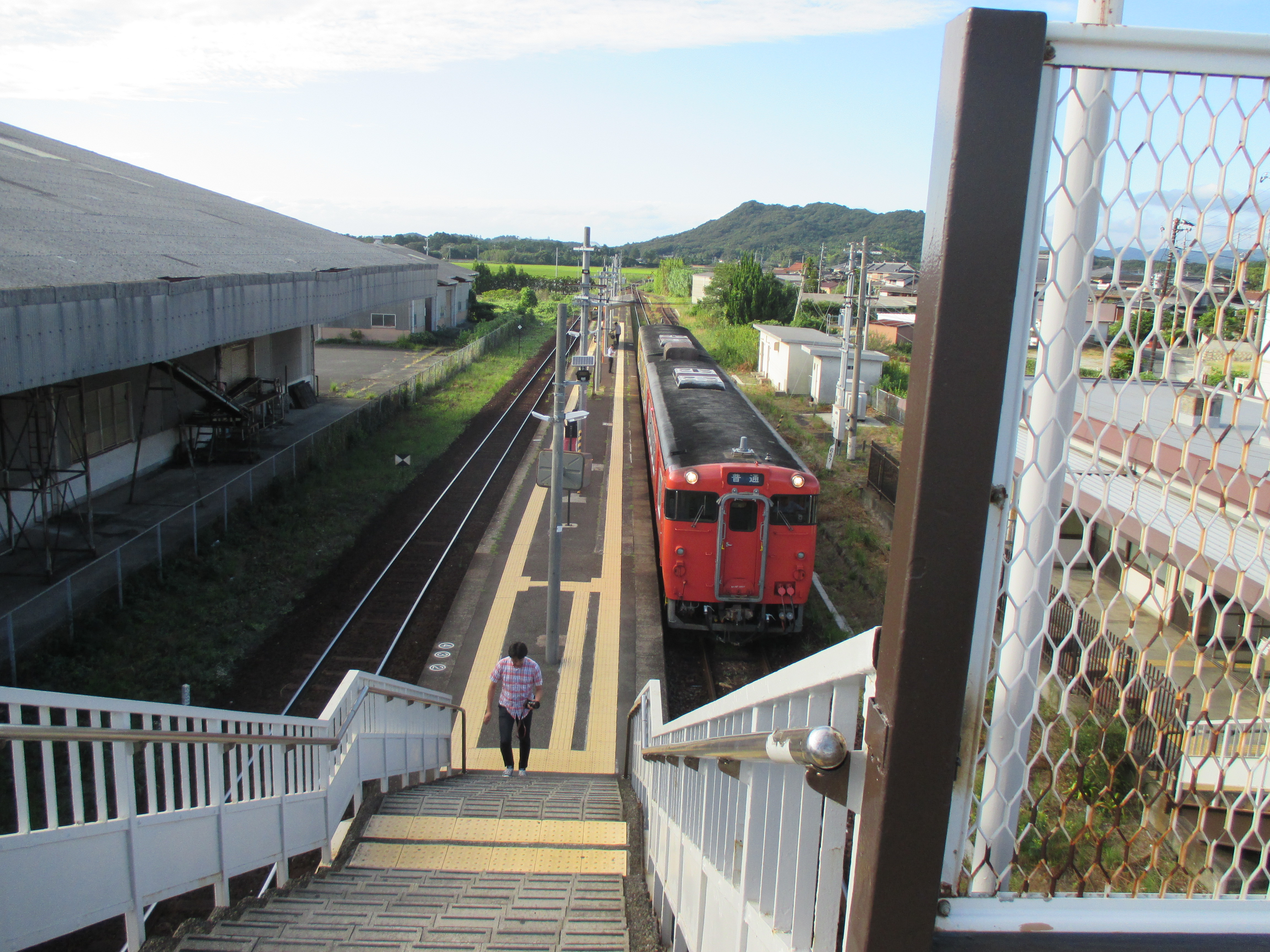 黒井村駅プラットホーム